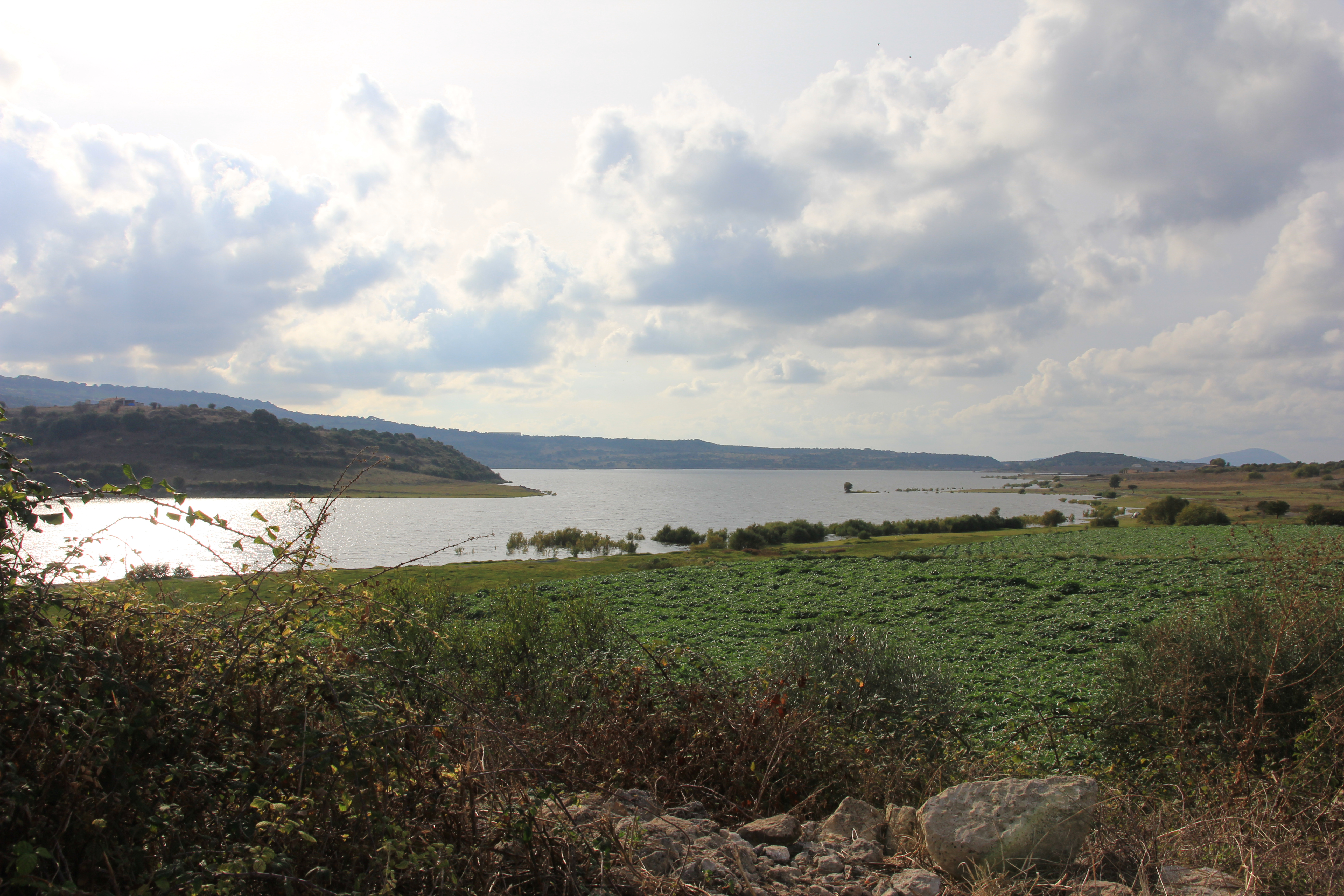 Lago del Cuga